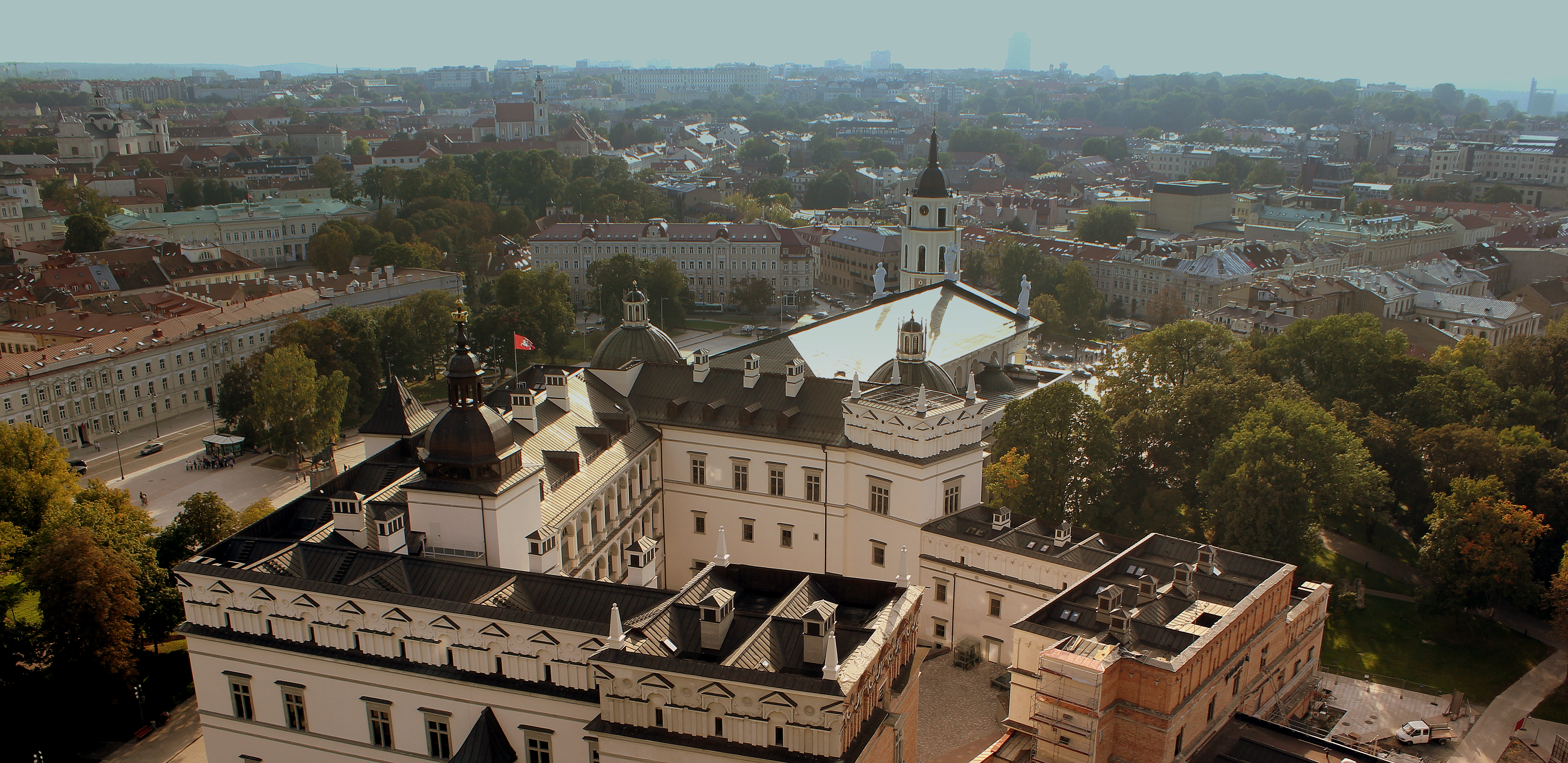 VILLINUS OLD TOWN LITHUANIA SEP 2013